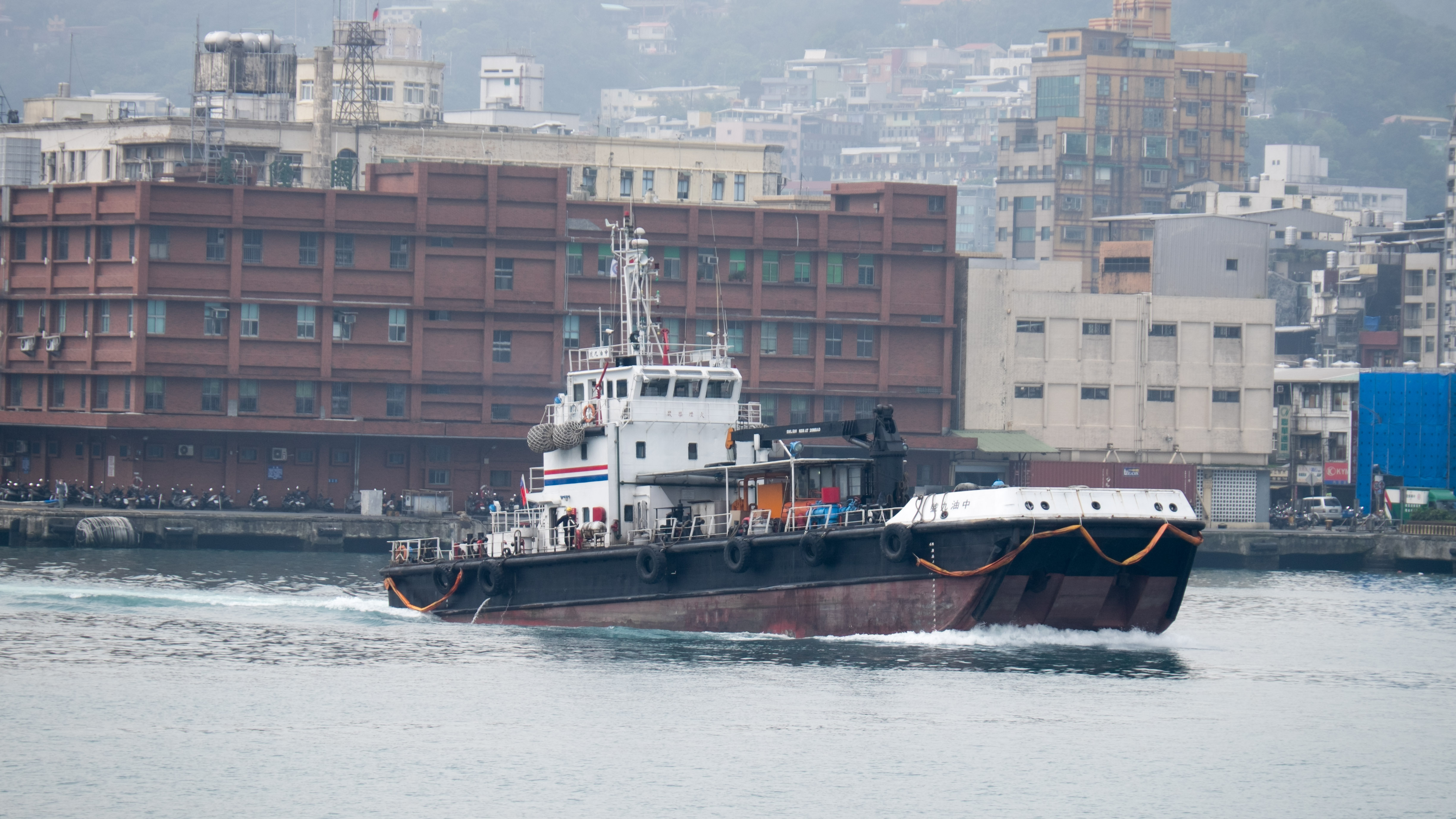 中文（台灣）: 基隆港海關大樓附近的中油油駁船中油九號。